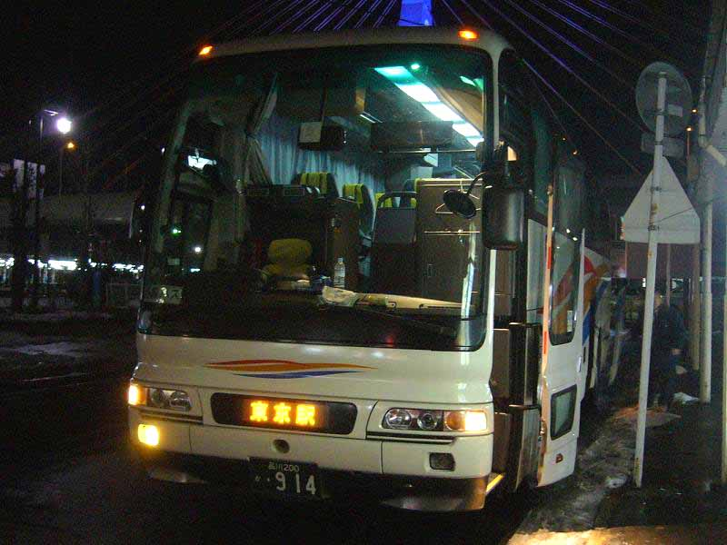 登録番号：品川200か・914 京浜急行バス羽田営業所所属 car no.6342 新製当初は京浜急行バス羽田営業所所属、2005年に京急観光バスに移籍、2008年より現所属 高速用車両（各系統で共通運用） 三菱ふそう・エアロクィーン PJ-MS86JP